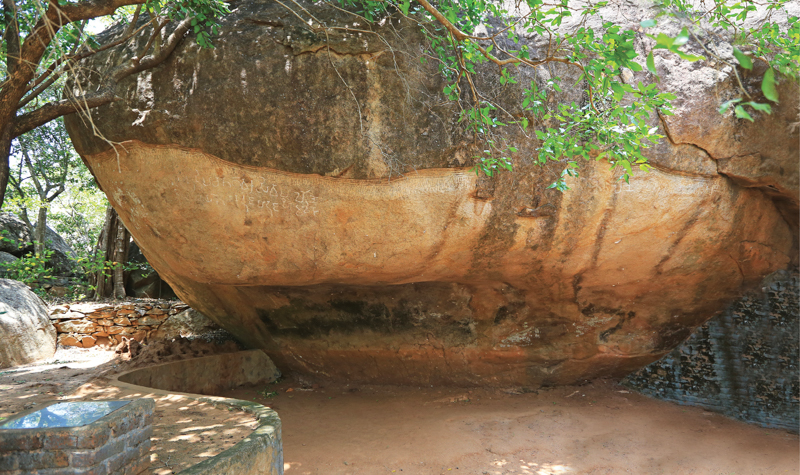 සිංහල: බිල්ලෑව ගුහාව